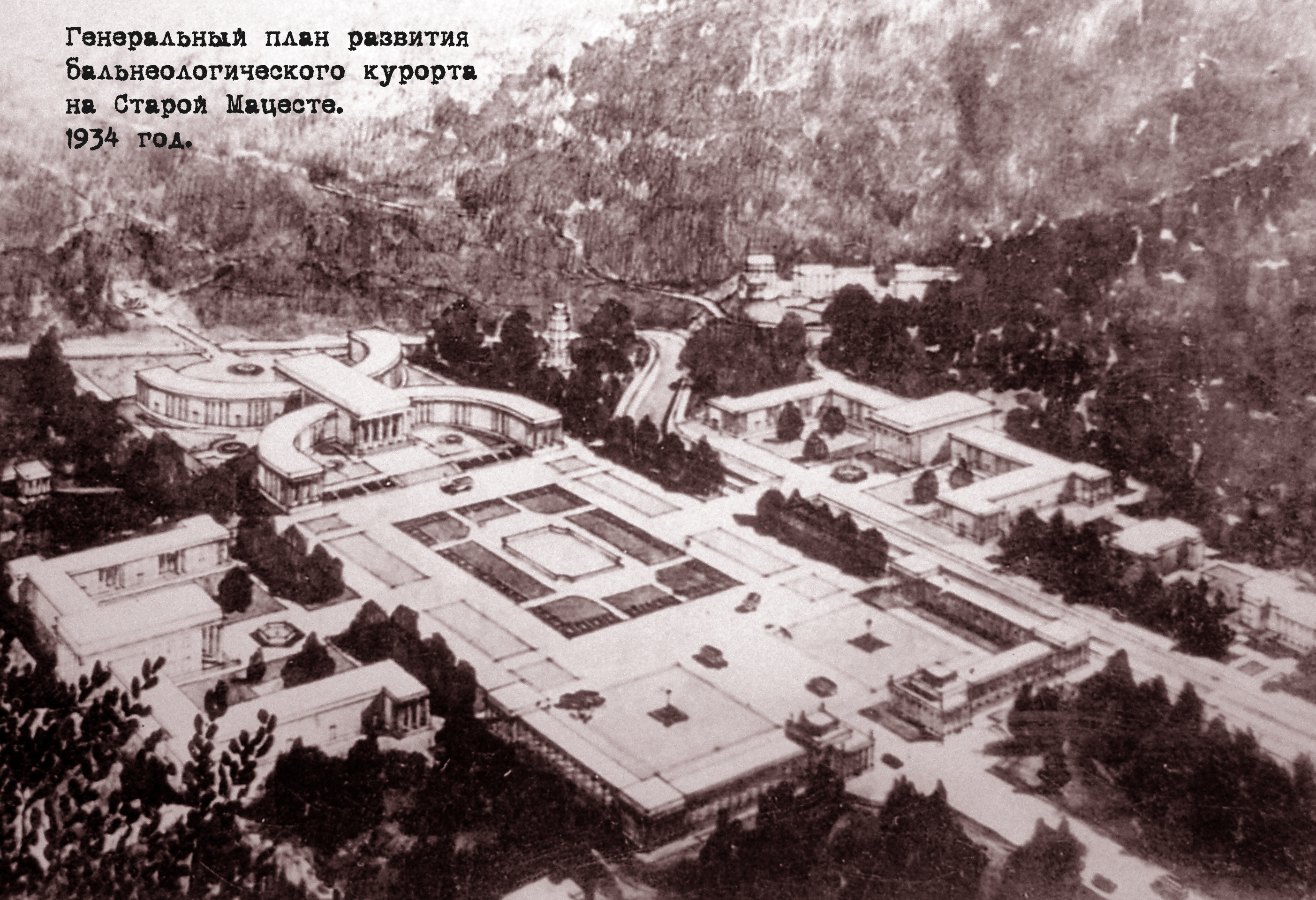 План развития